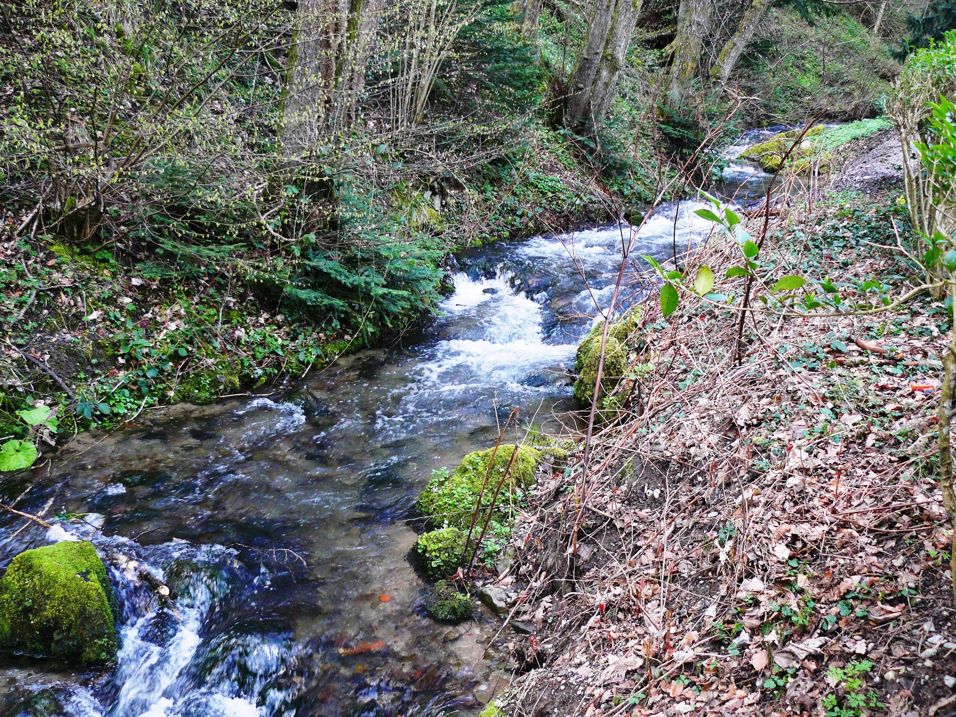 Murbach.JPG